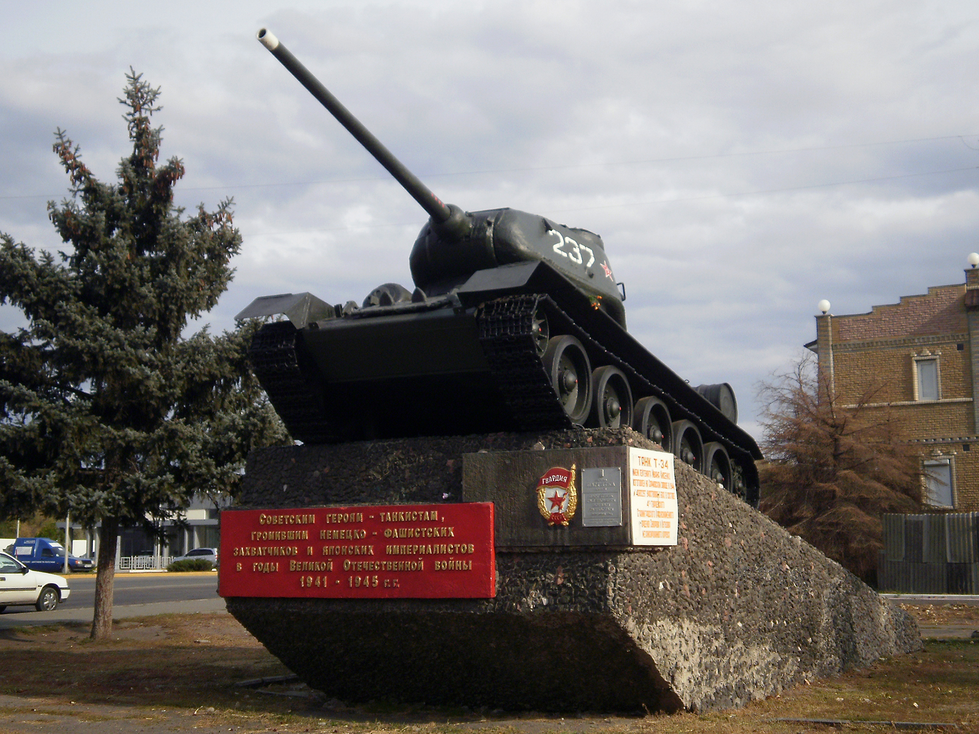 Луганск. Острая могила